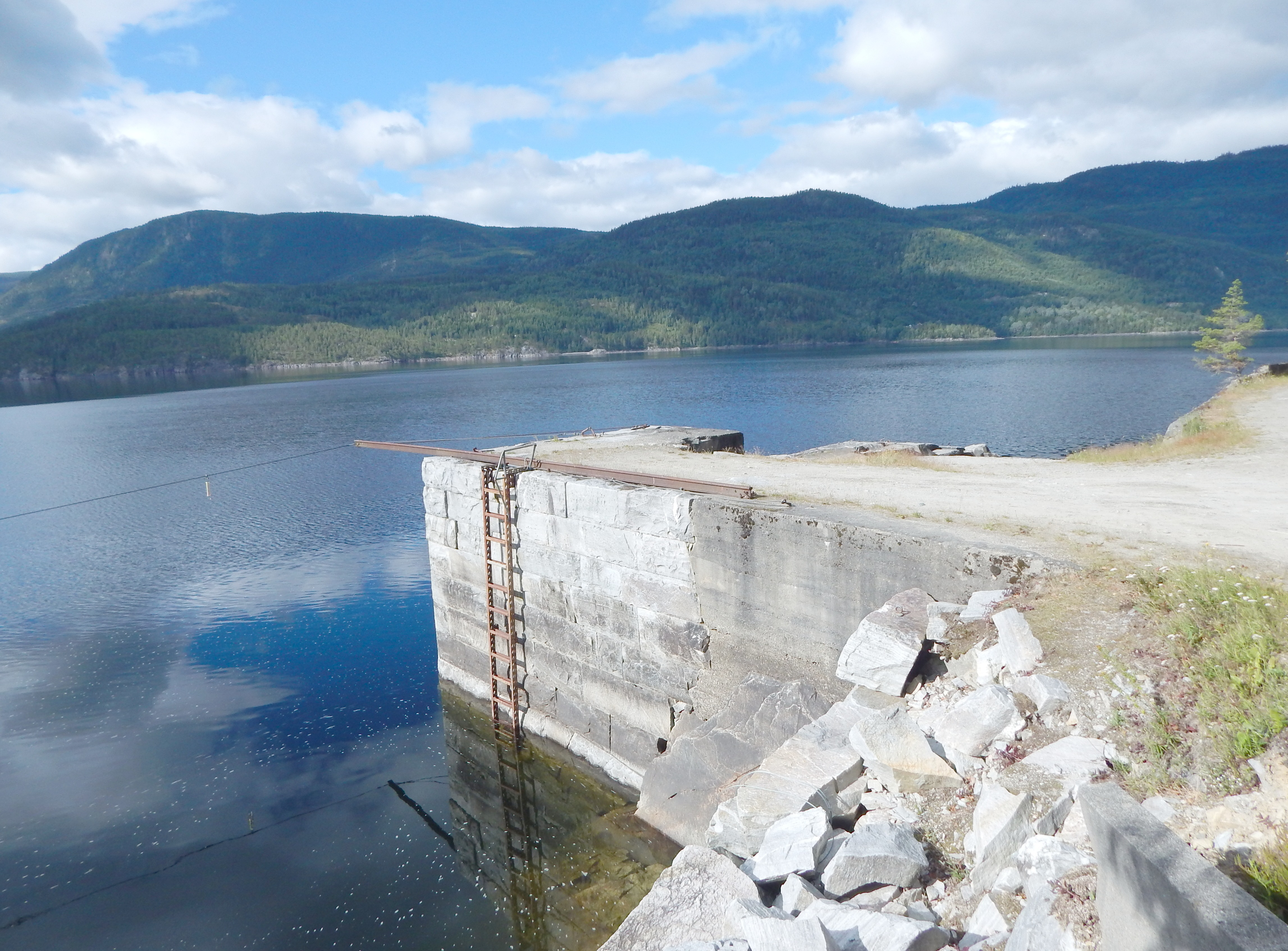 Hovin brygge